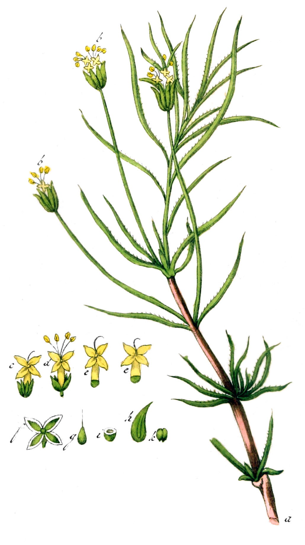 Tab. 41, Vervolg ob de Avbeeldingen der artseny-gewassen met derzelver Nederduitsche en Latynsche beschryvingen, Eersde Deel, 1813